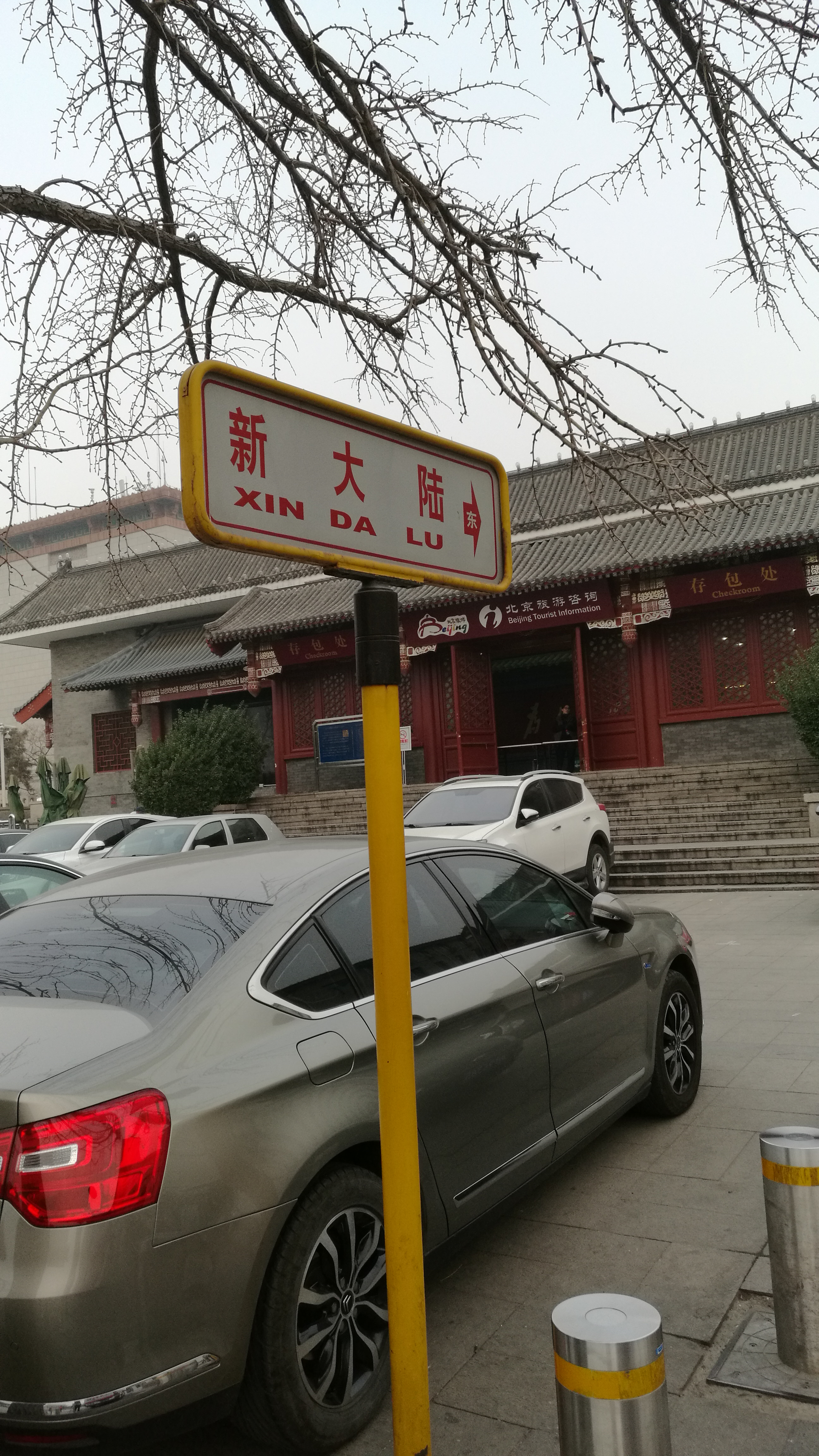 显示“新大陆”路名的路名牌，位于新大陆西口，天安门广场东侧路。